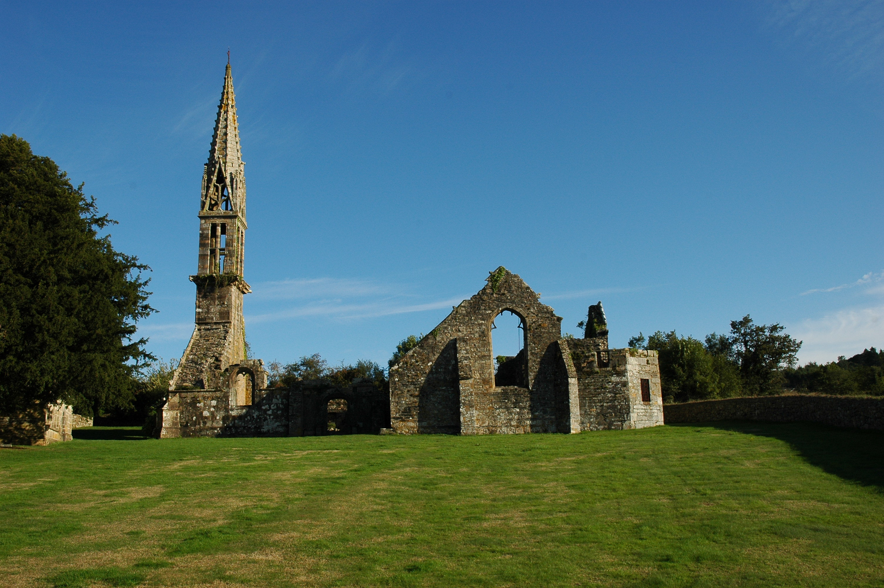 Ruines de l'église Saint-Pierre au Vieux Bourg de Quimerc'h à Pont-de-Buis-lès-Quimerch, Finistère, France